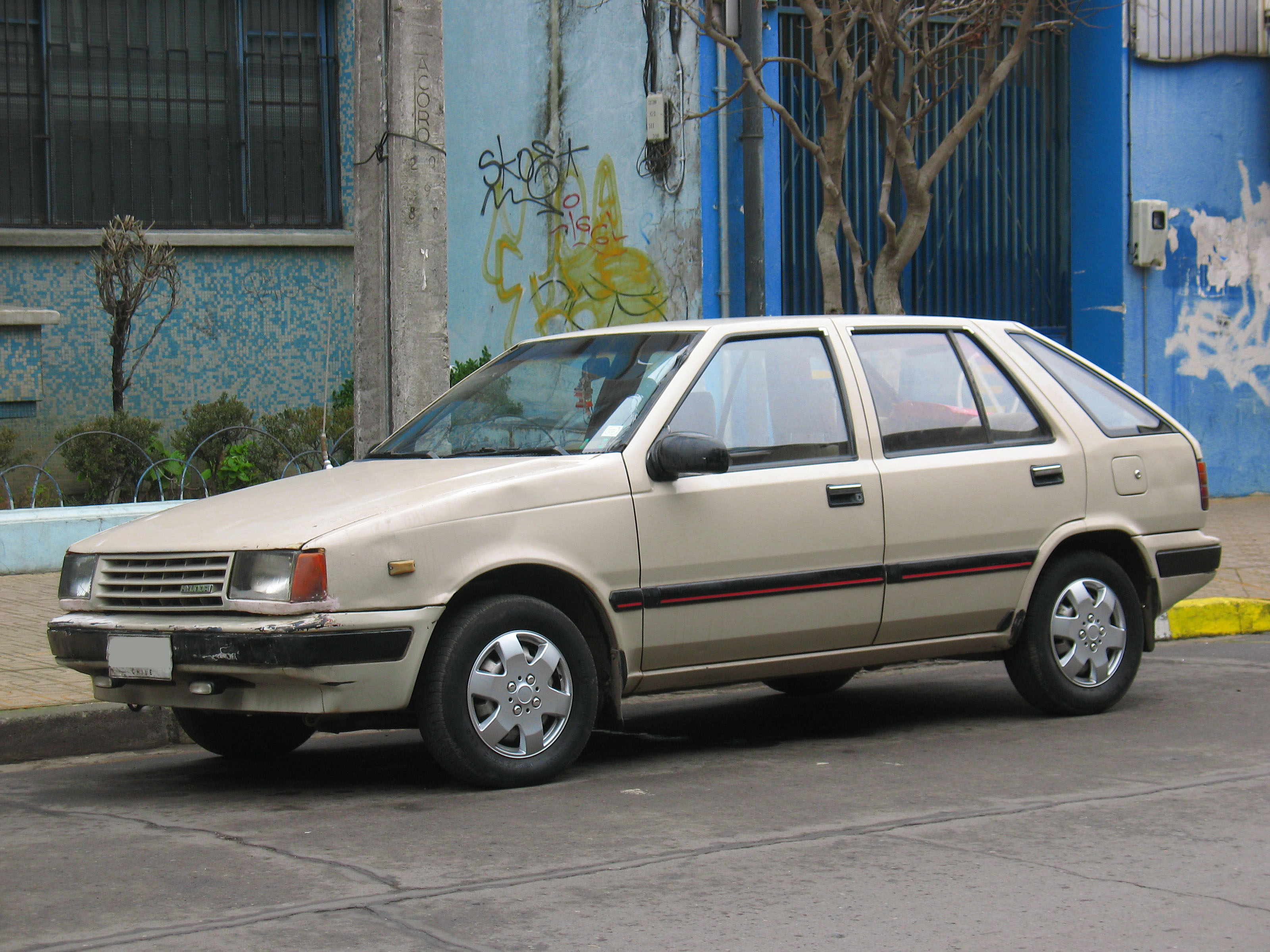 Hyundai Excel 1.3 GL Liftback 1989